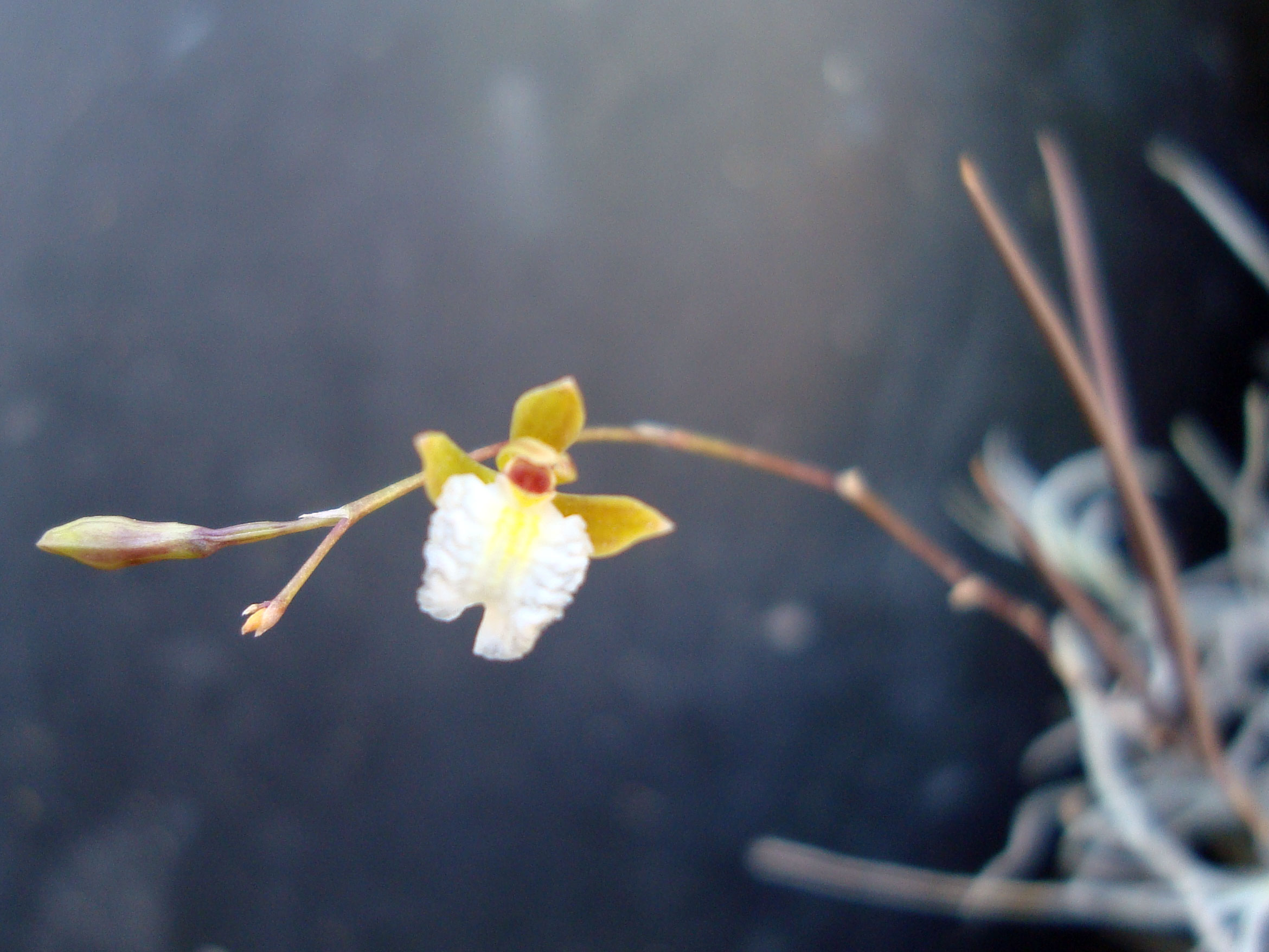 Microepidendrum subulatifolium, syn. Encyclia subulatifolia